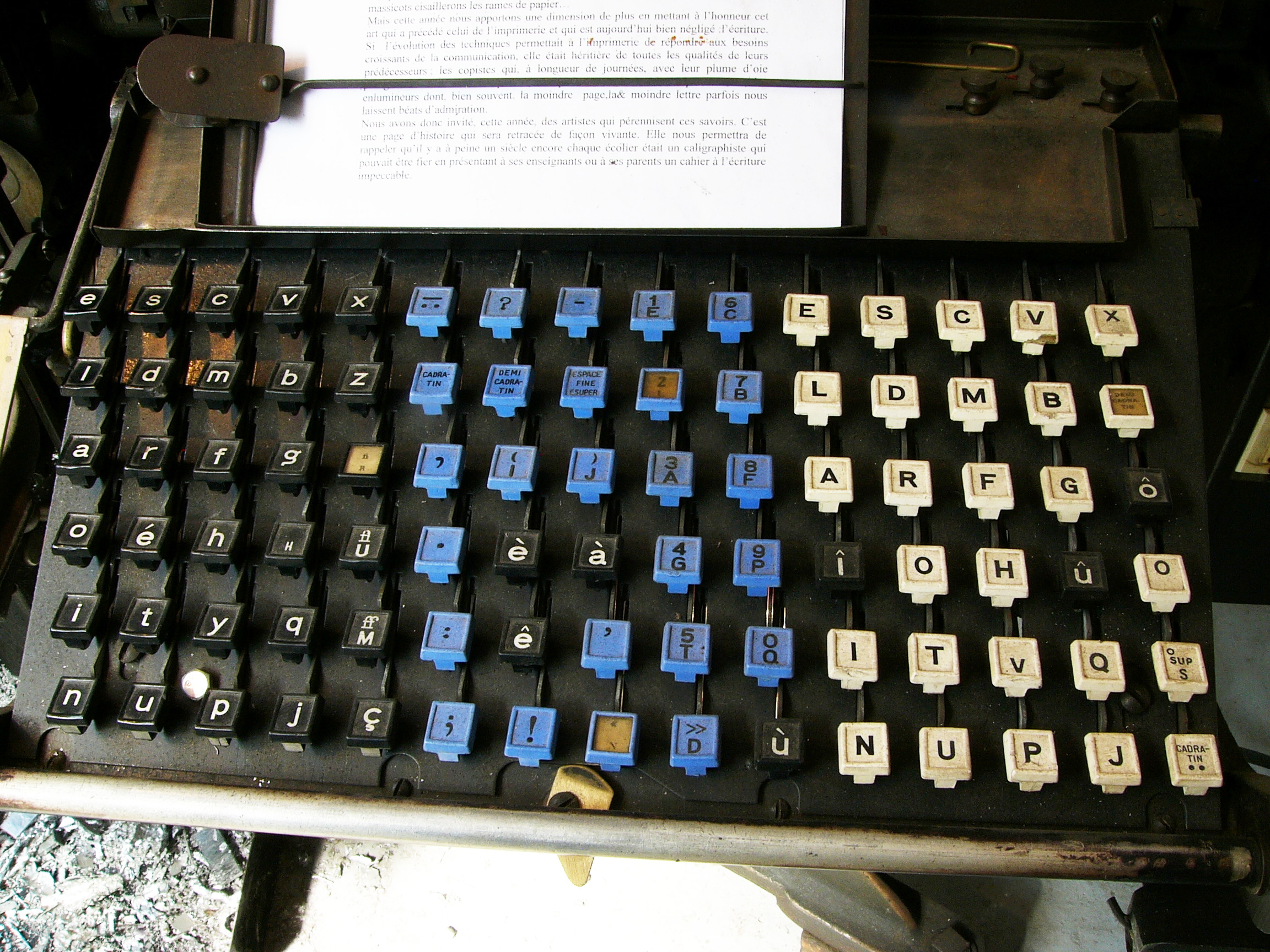 Clavier de la Linotype exposée au Centre d’Histoire Sociale de Haute-Normandie, Expotec 103, à Rouen. Il comporte 90 touches organisées en lignes (verticales). La touche espace est séparée du clavier (on peut en voir un morceau sur la gauche)